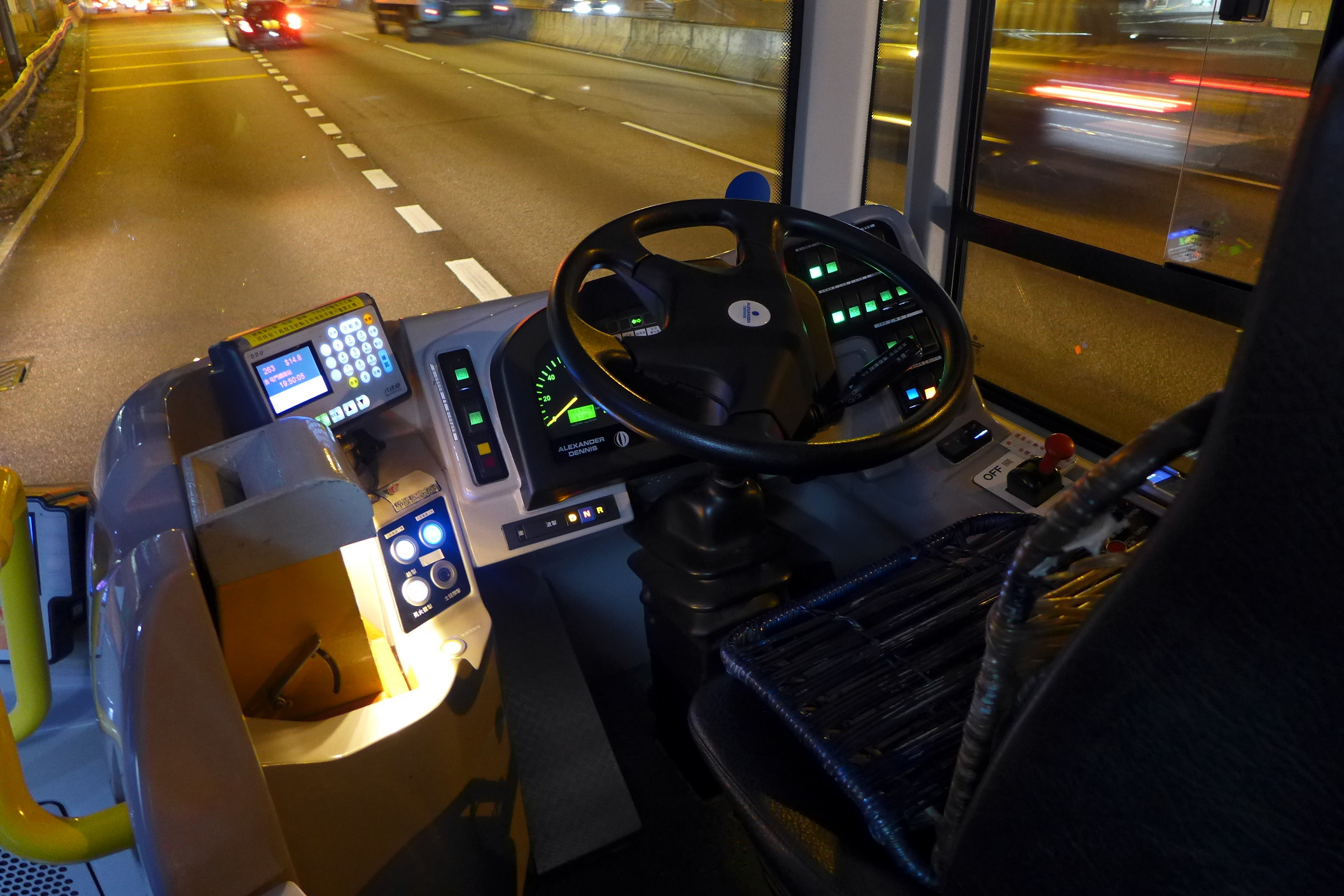 ATENU229 SL4149 drive area